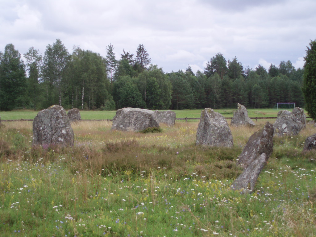 Gravfältet Smålandsstenar (RAÄ-nummer Villstad 52:1) i nordöstra delen av samhället Smålandsstenar, Gislaveds kommun, Jönköpings län, Småland, Sverige.